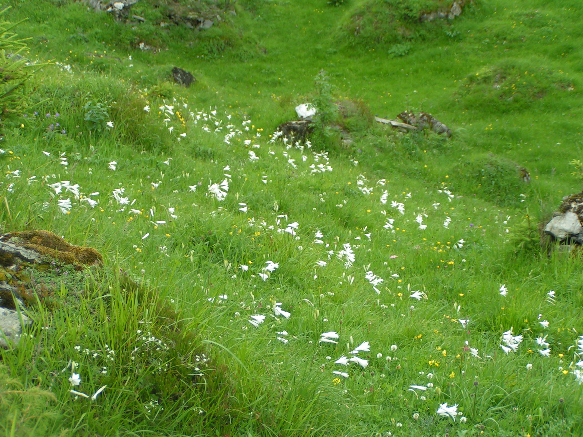 Paradiseum liliastrum